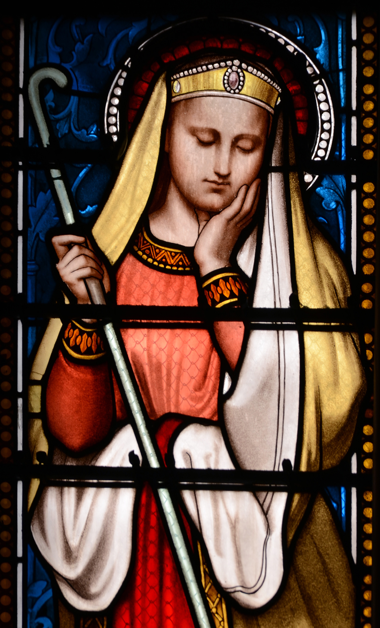 Vitrail de la Basilique d'Ars : Sainte Reine ( détail )